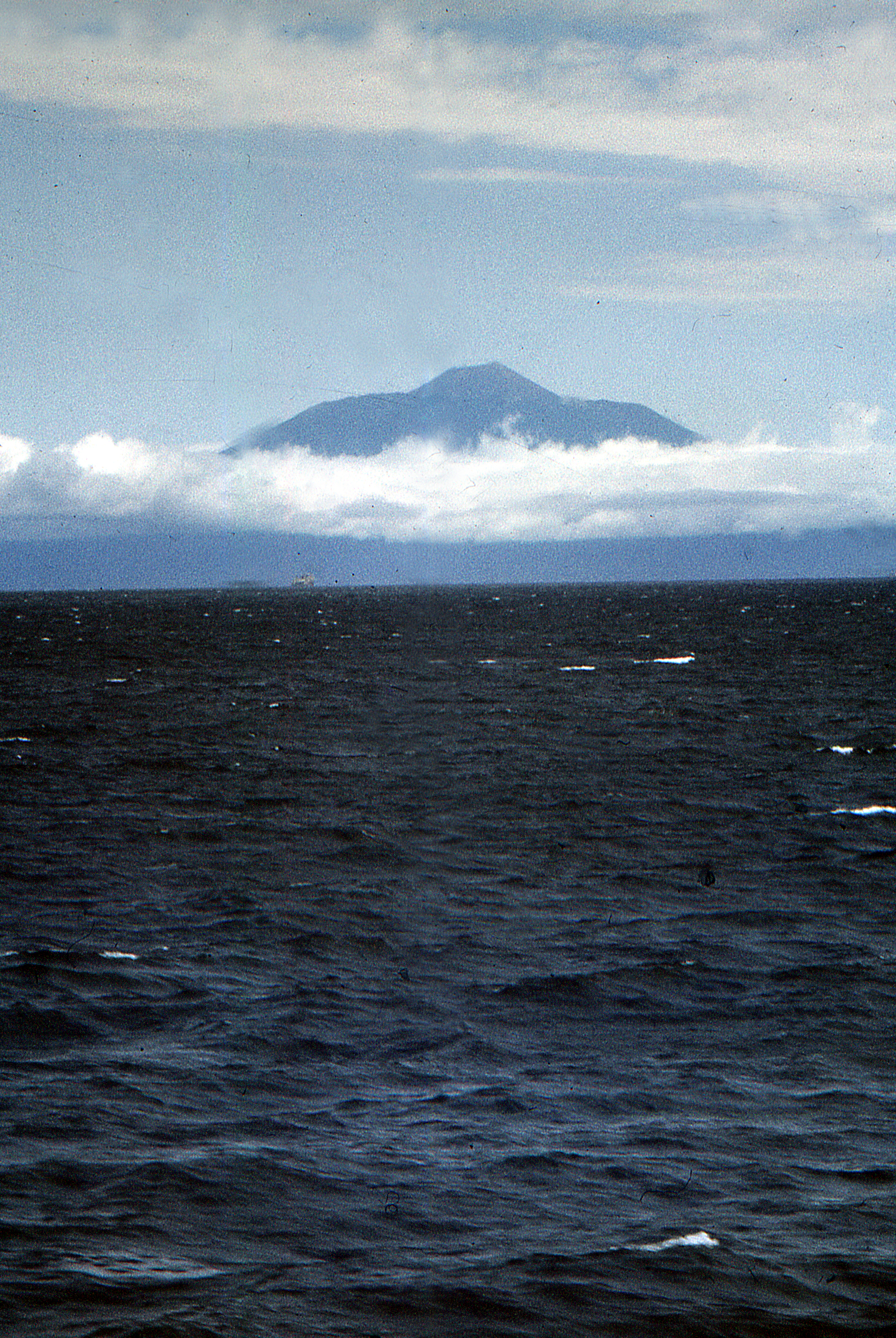 Вулкан Тятя. Остров Кунашир